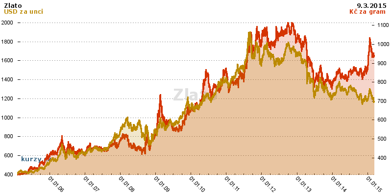 Zlato - Cena zlata v USD/oz a Kč/gram.